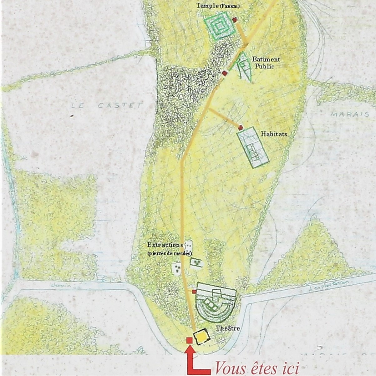 Plan de Brion à l'entrée du site archéologique